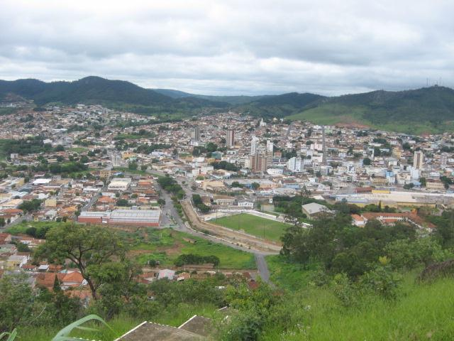 Vista da cidade de Pará de Minas, Minas Gerais, Brasil